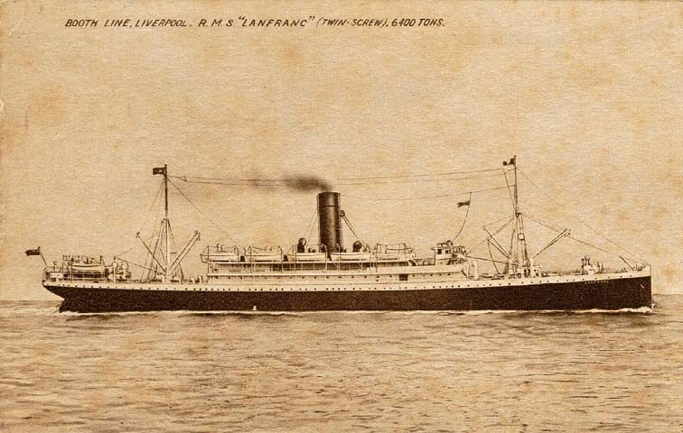 HMHS Lanfranc